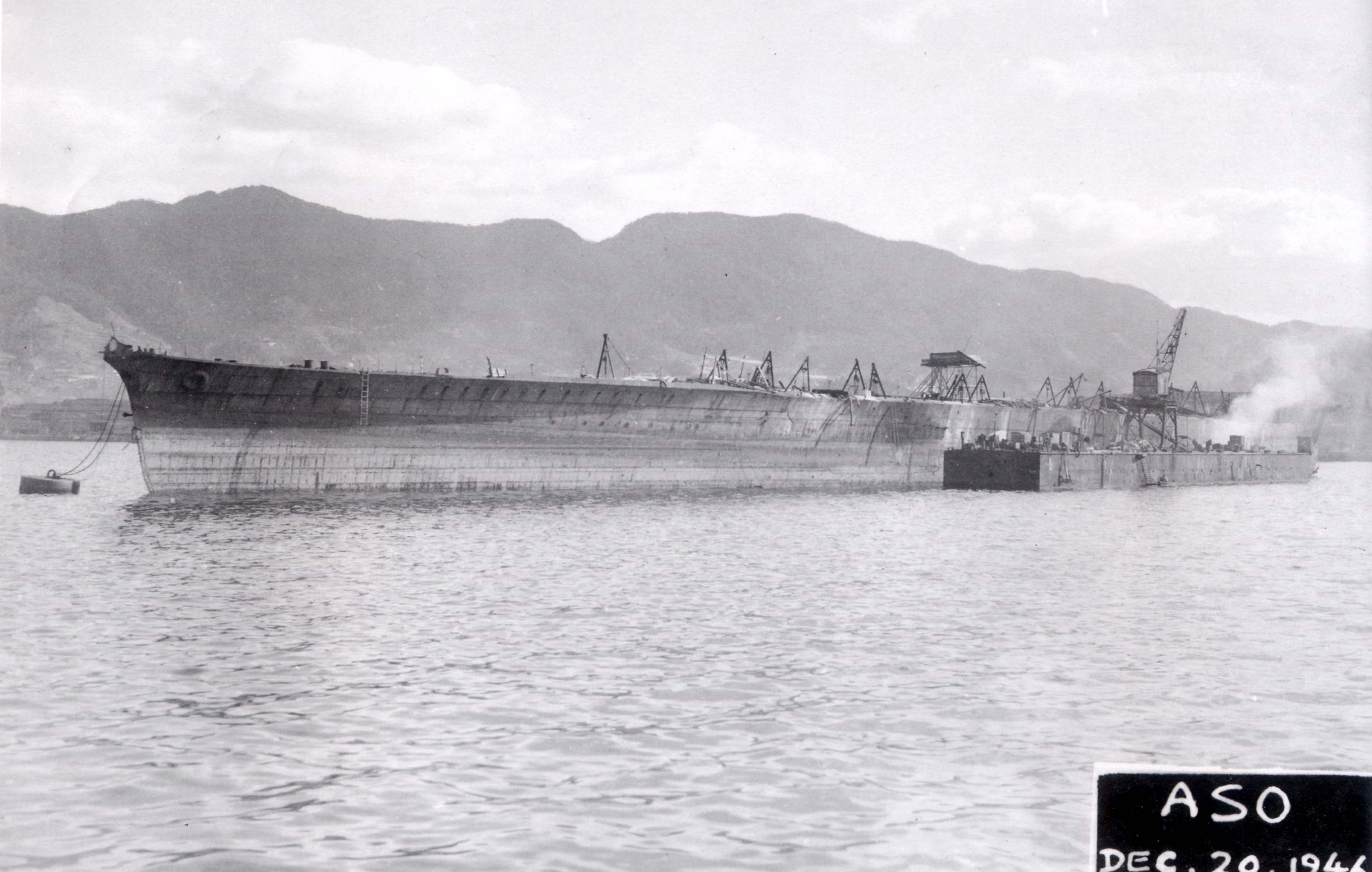 日本海軍航空母艦雲龍型「阿蘇」呉港内にて撮影。